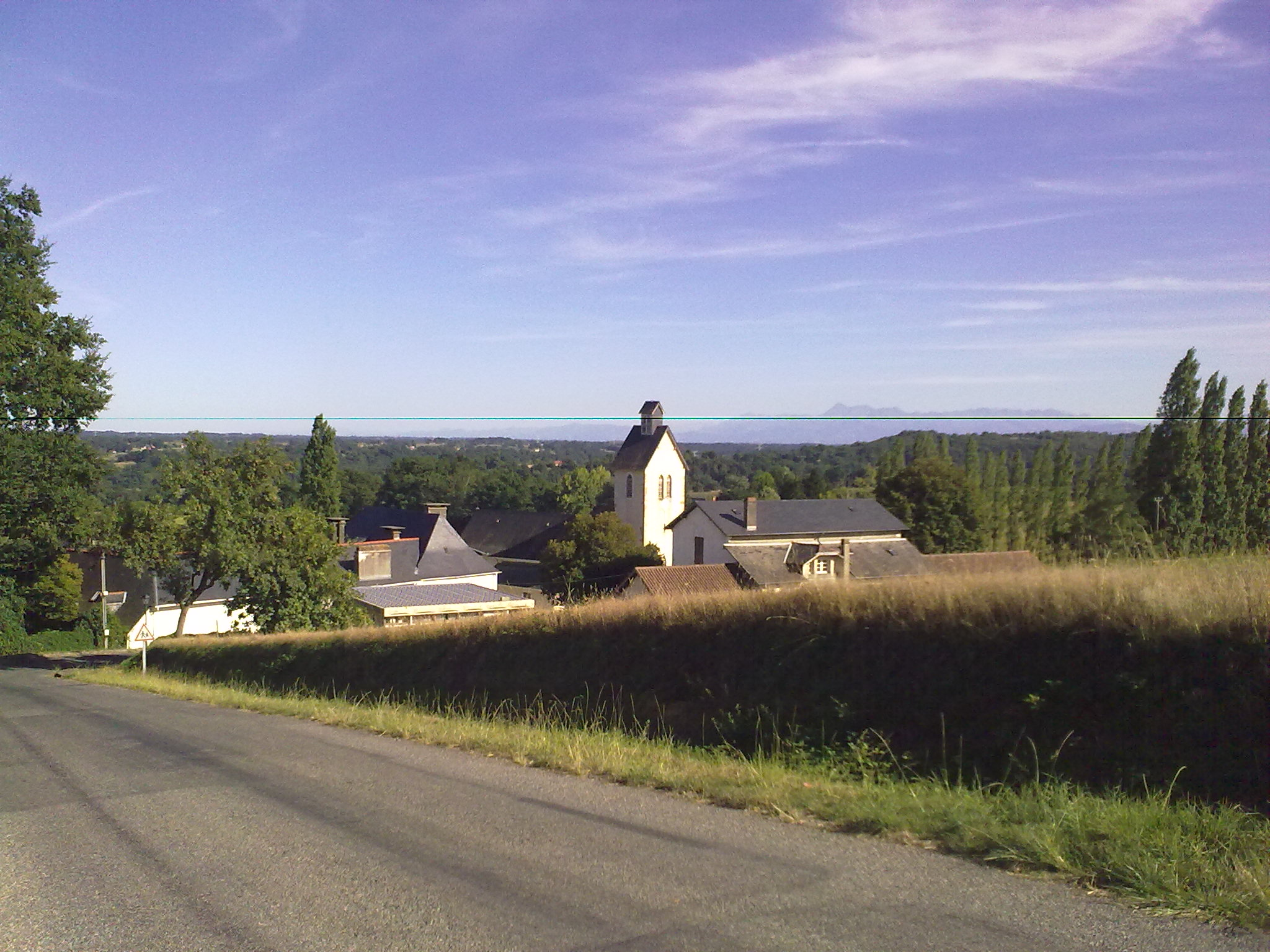 Saint-Armou le 30 août 2010, France.